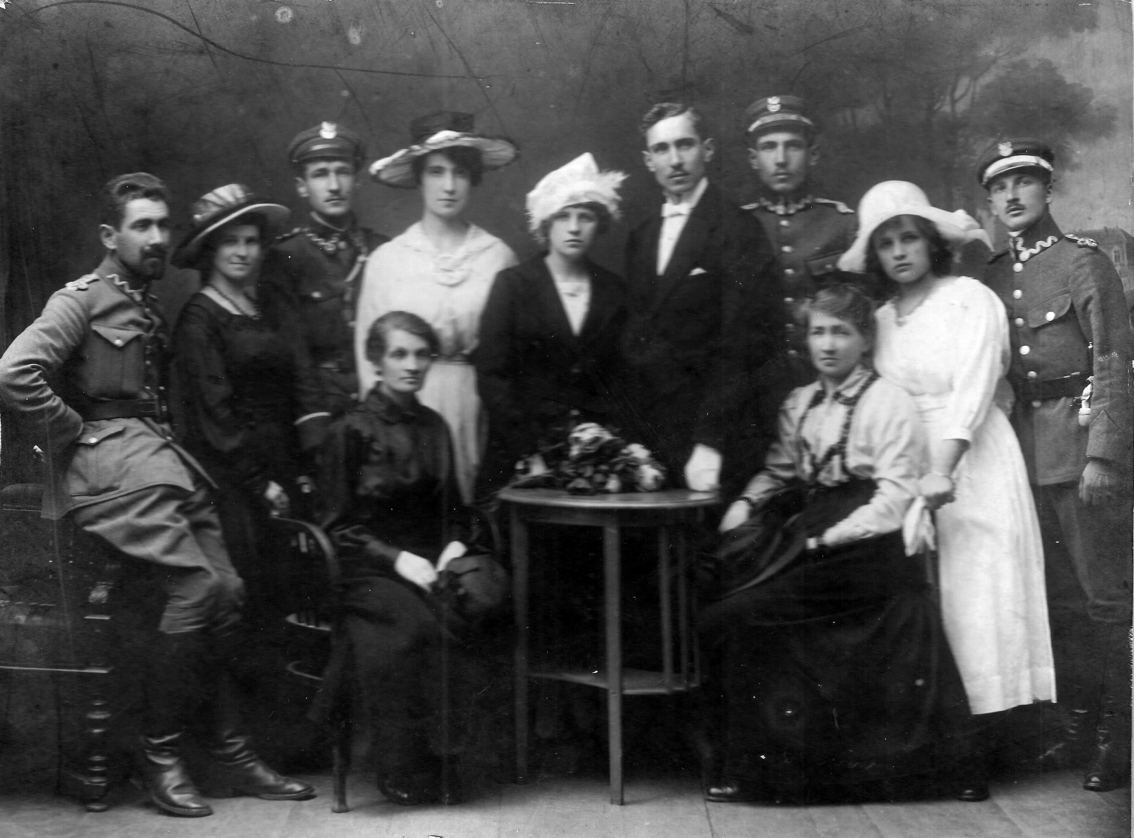 Zdjęcie ślubne Państwa Tatkowskich.